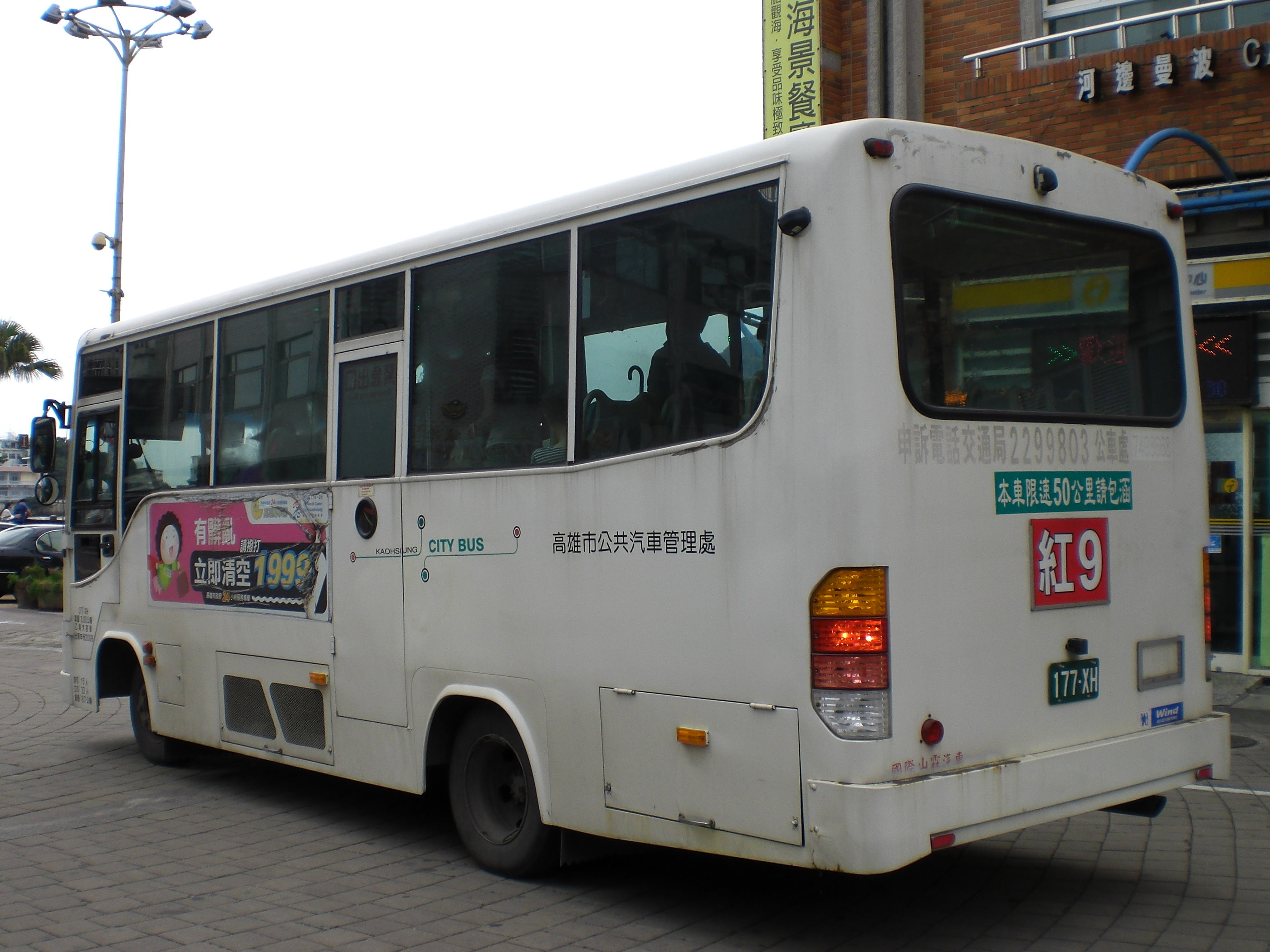 高雄市公共汽車管理處的五十鈴NQR75PBL中型巴士177-XH左後方外觀